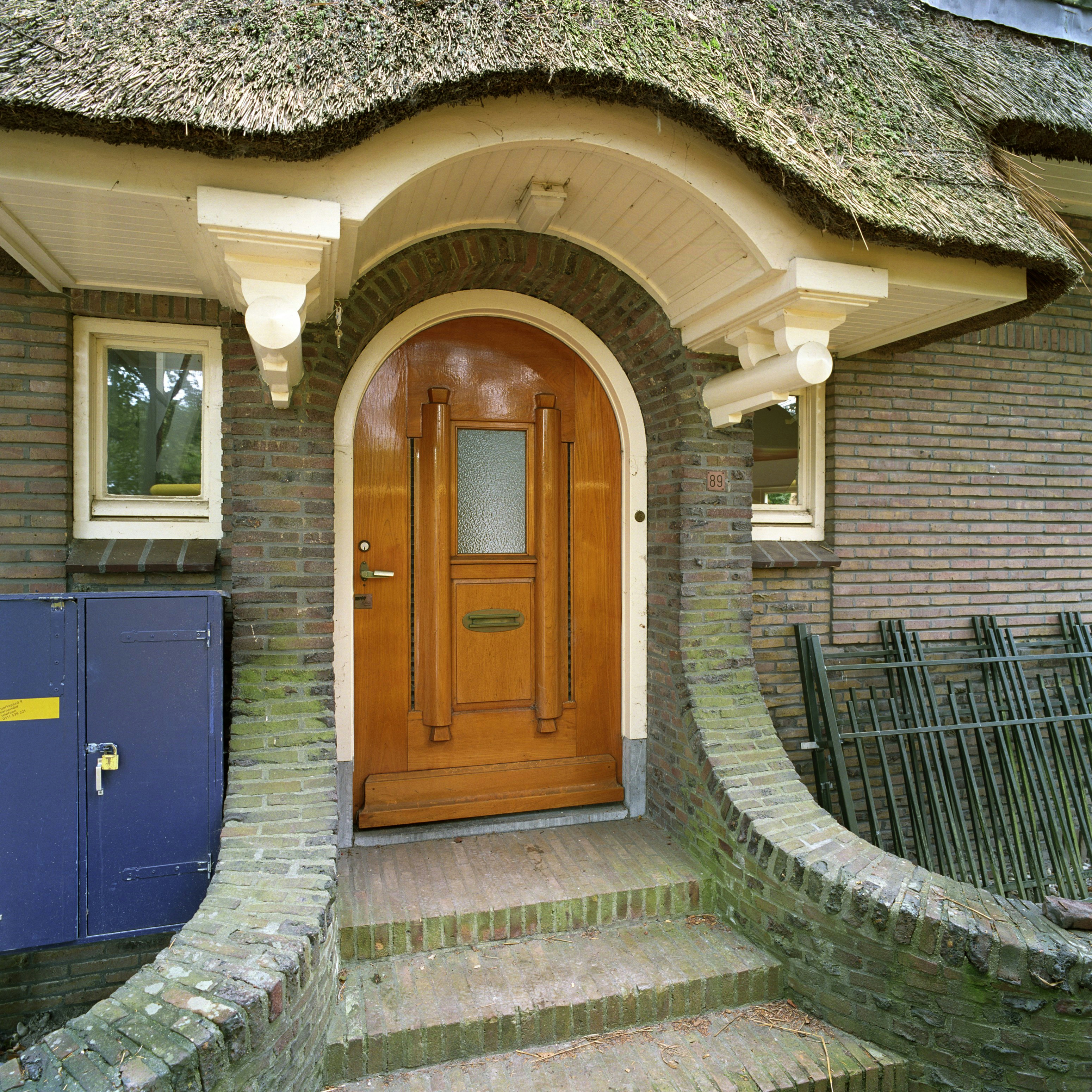 De Zandhoeve: Entree